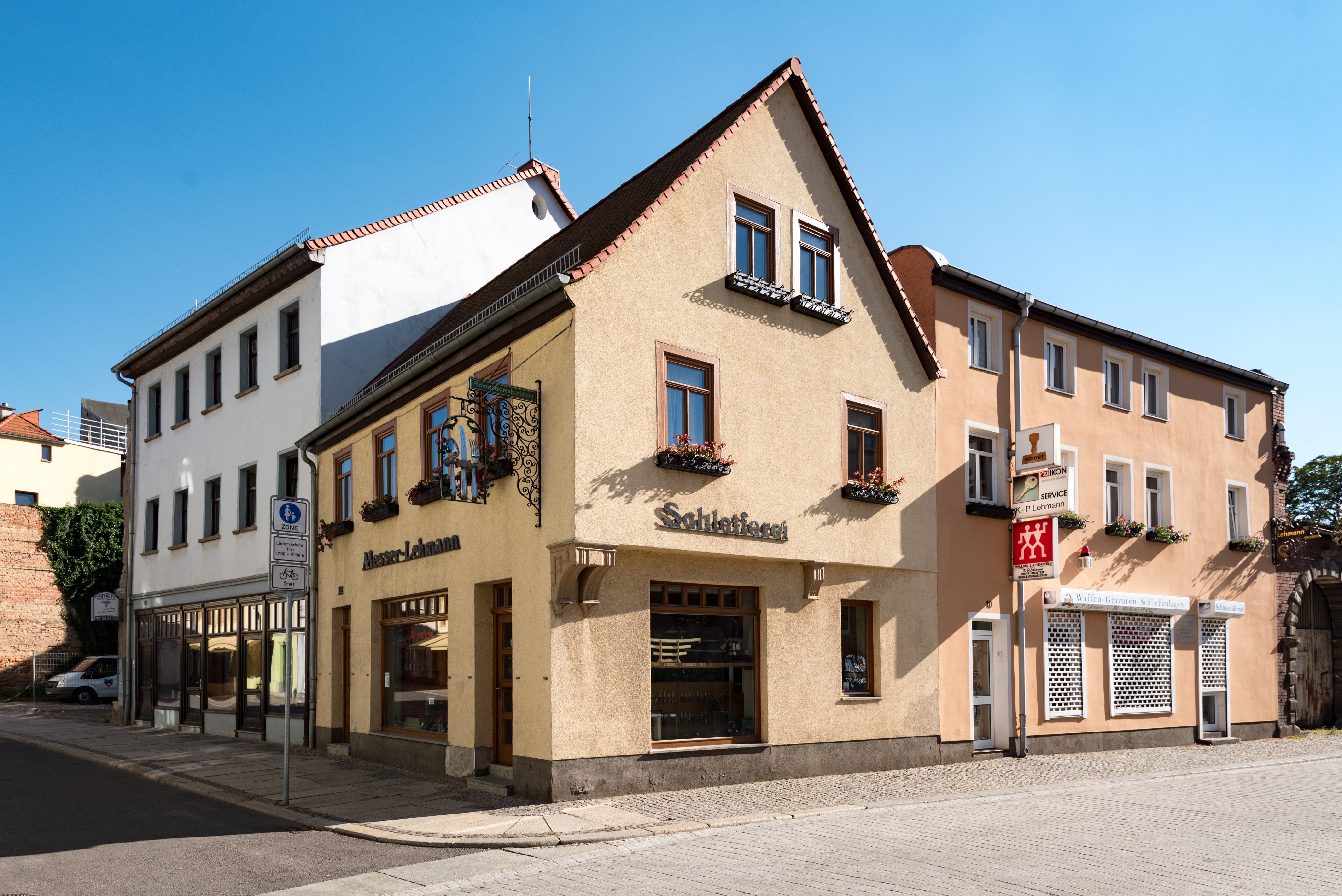 Weißenfels, Kleine Kalandstraße 14